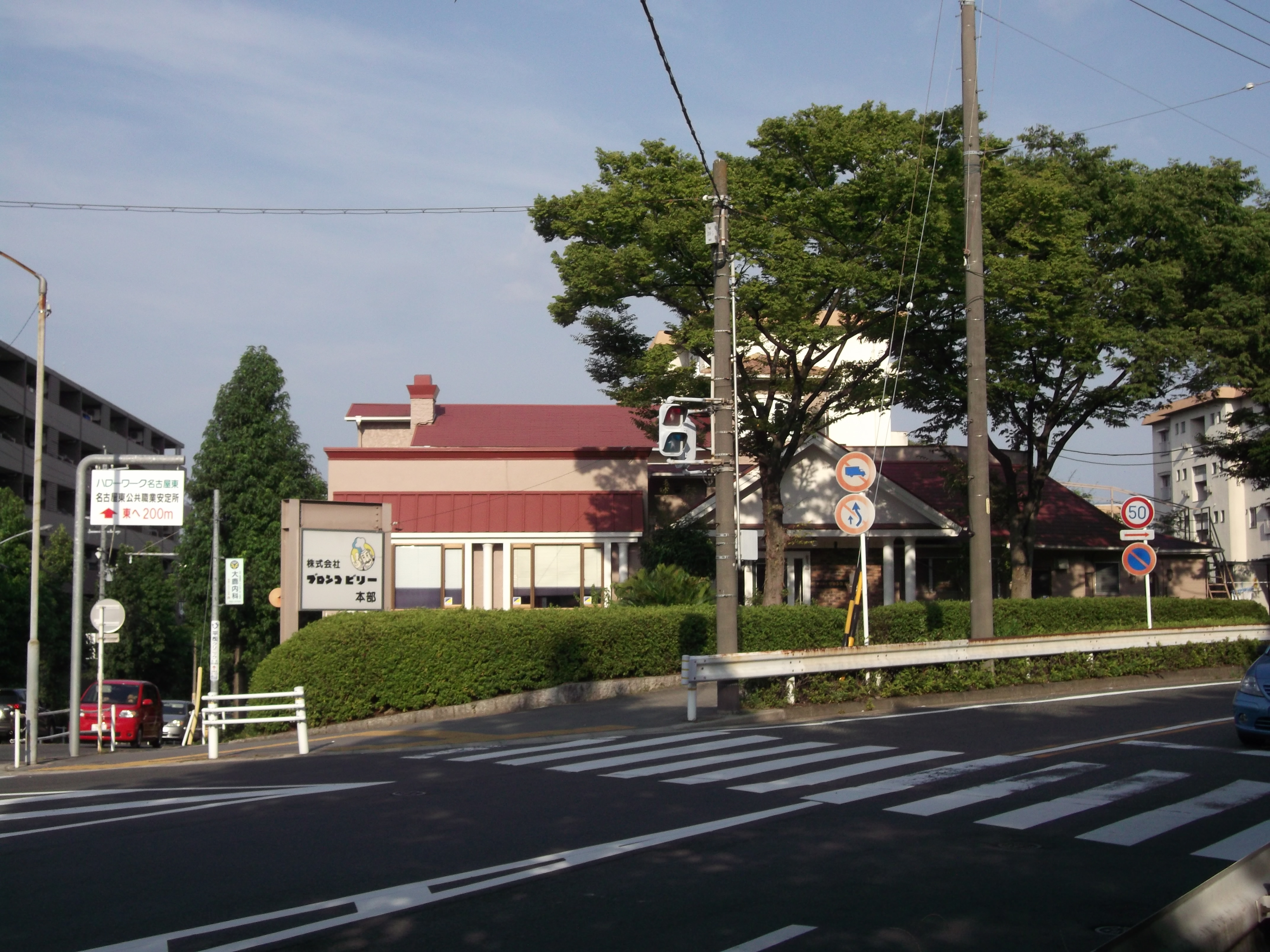 名古屋市名東区平和が丘にあるブロンコビリー本社